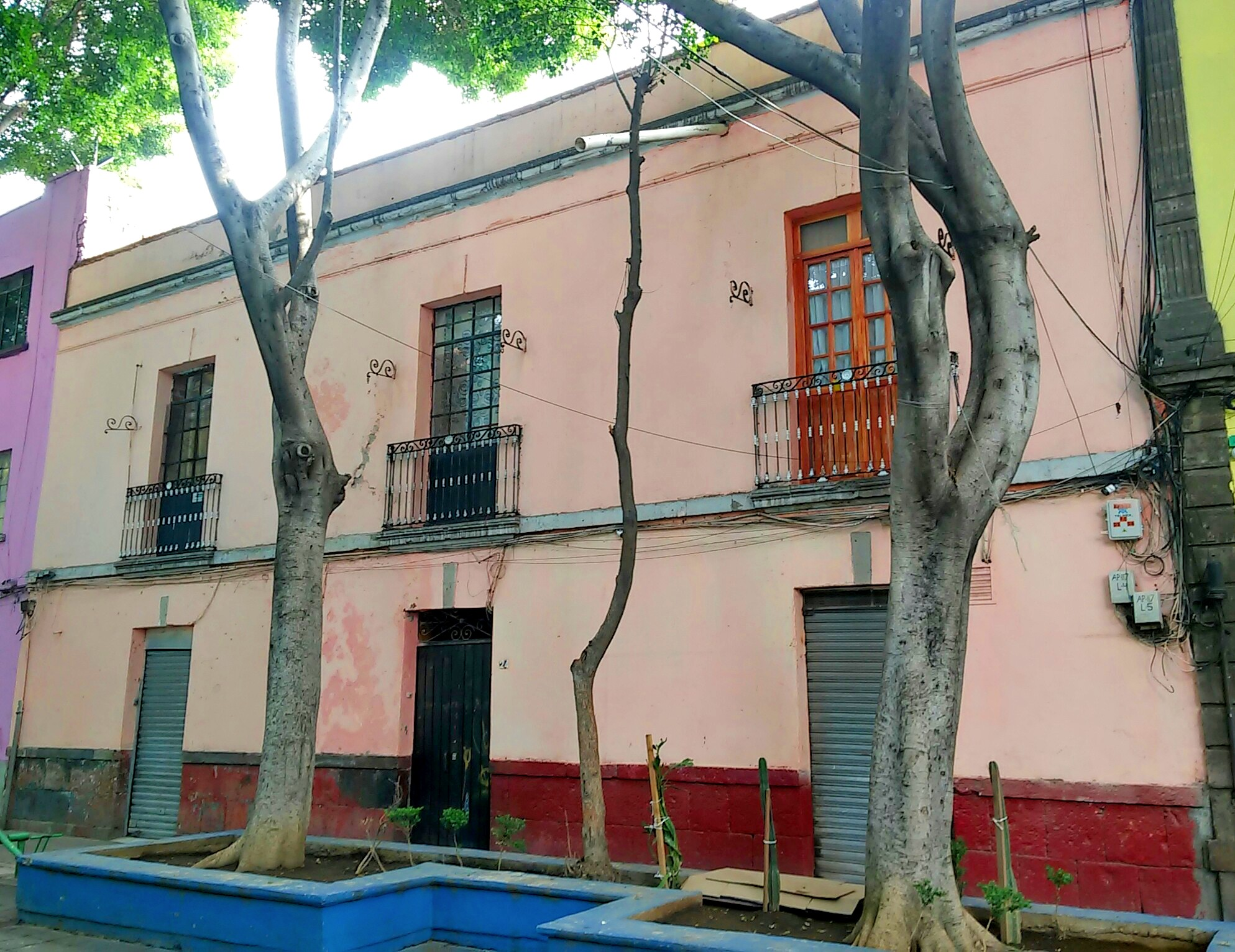 Casa de la calle Mariana R. del Toro de Lazarín 24 conocida como de los huesitos